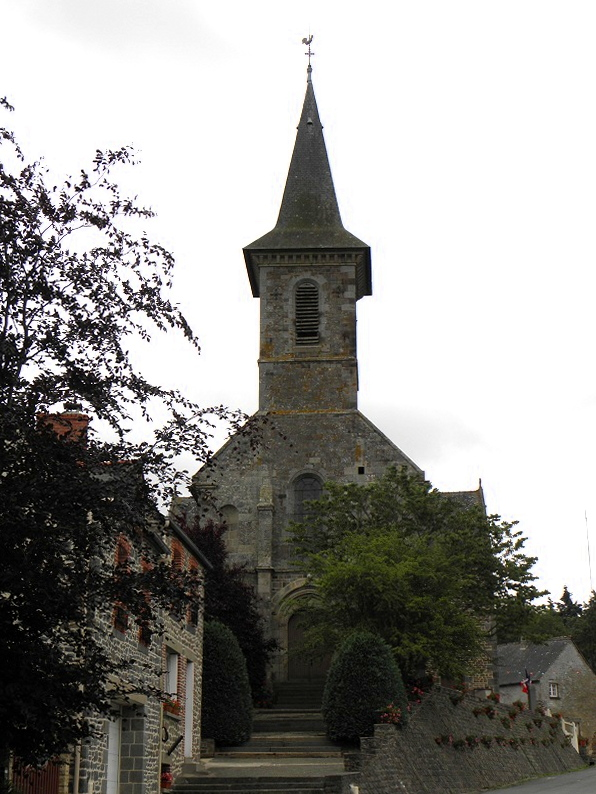 Église de Trévérien (35).